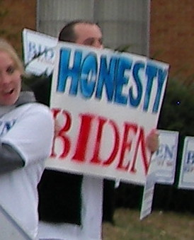 Biden supporters